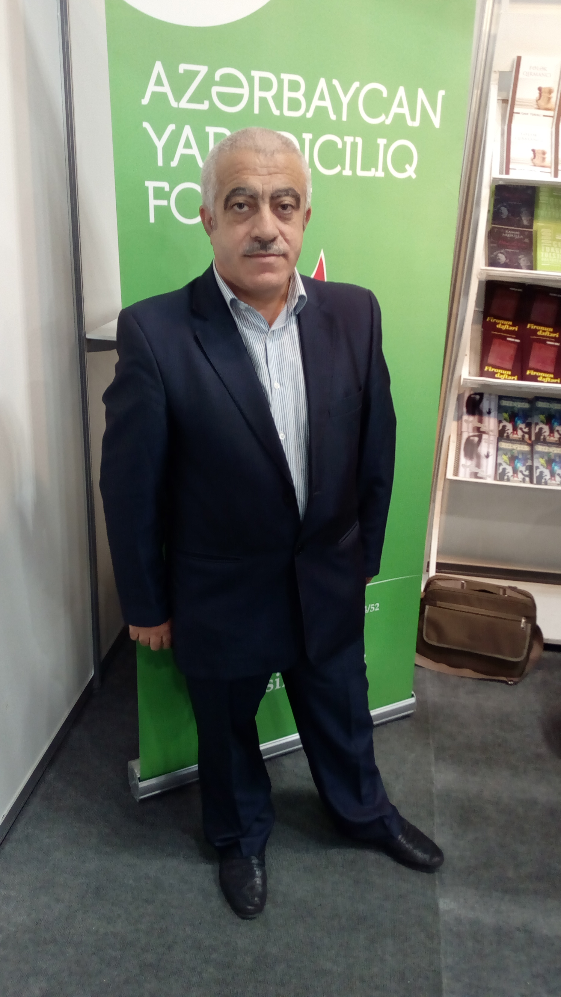 V Bakı Beynəlxalq Kitab Sərgi-Yarmarkası